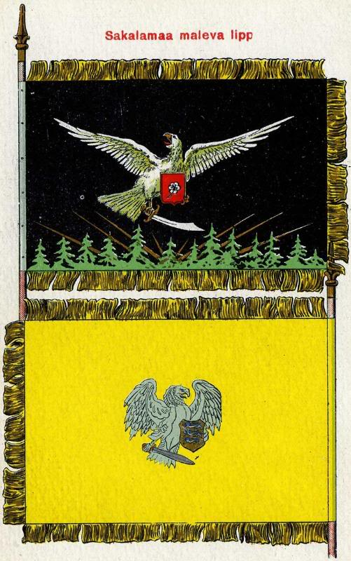 Kaitseliidu Sakalamaa maleva lipp